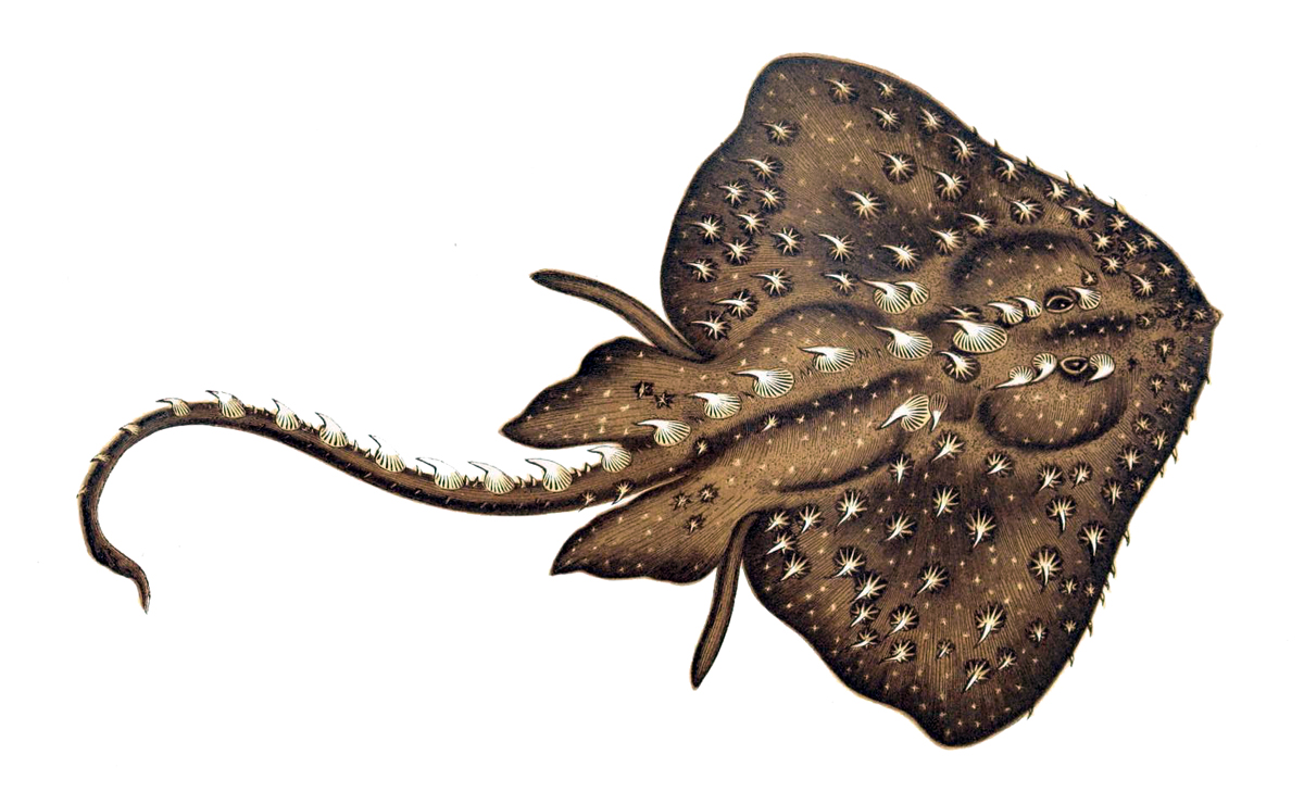 Amblyraja radiata